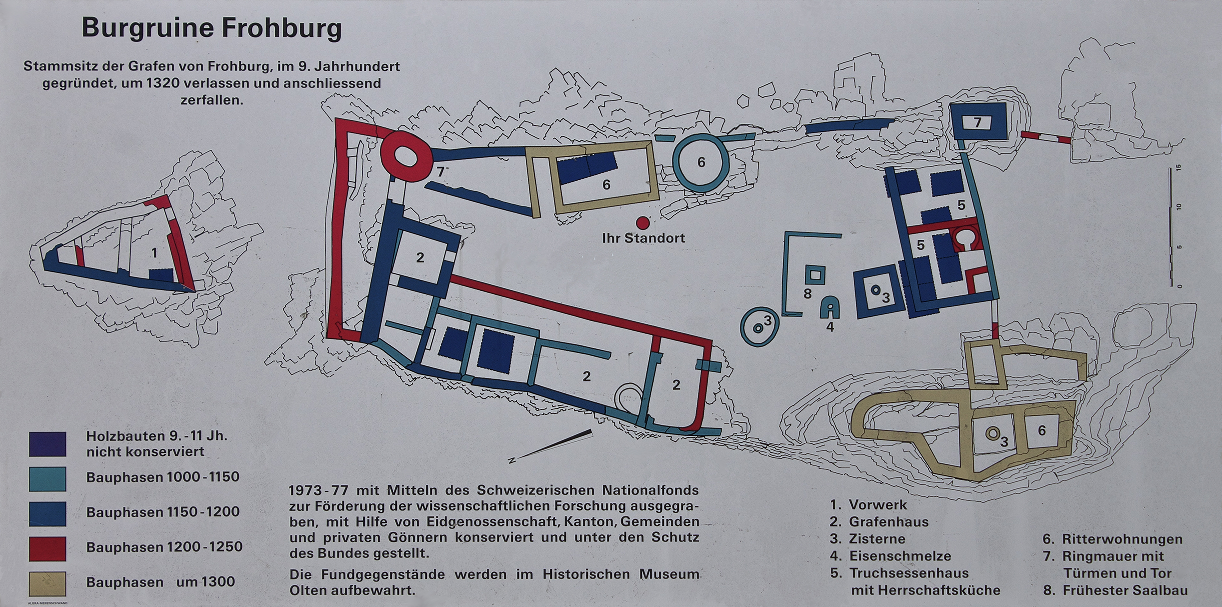 Informationstafel der Ruine Frohburg in Trimbach